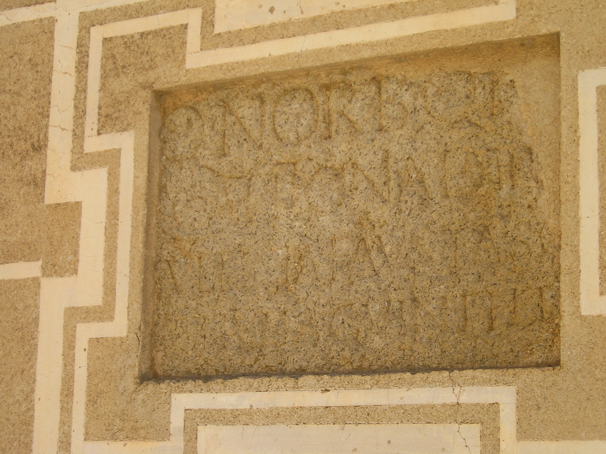 CIL II, 695. Placa funeraria del siglo I de Q. Norbanus en el casco histórico de Cáceres